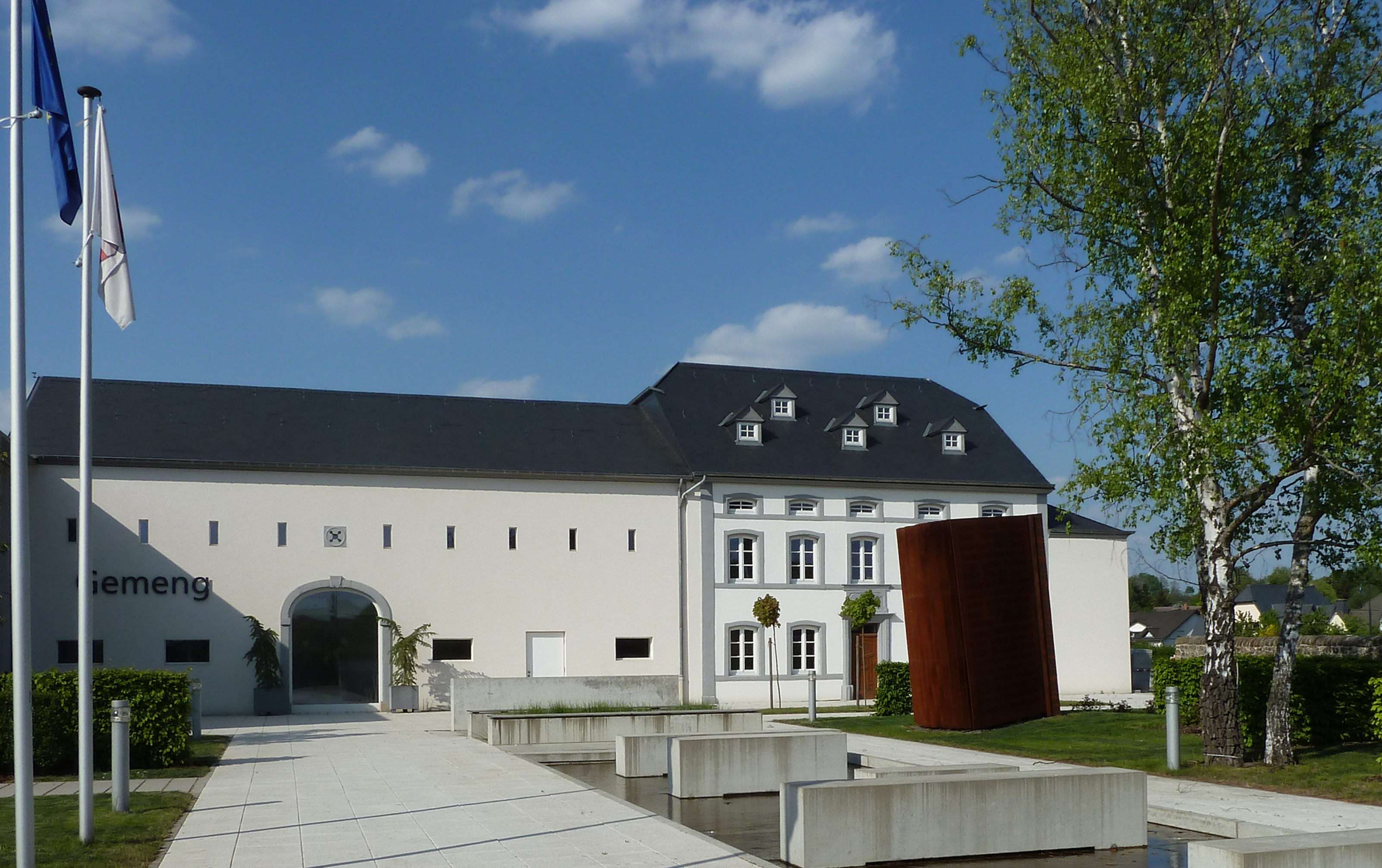 Sujet: D'Gemeng vu Jonglënster Auteur:User:Johnny Chicago Source: eege Foto